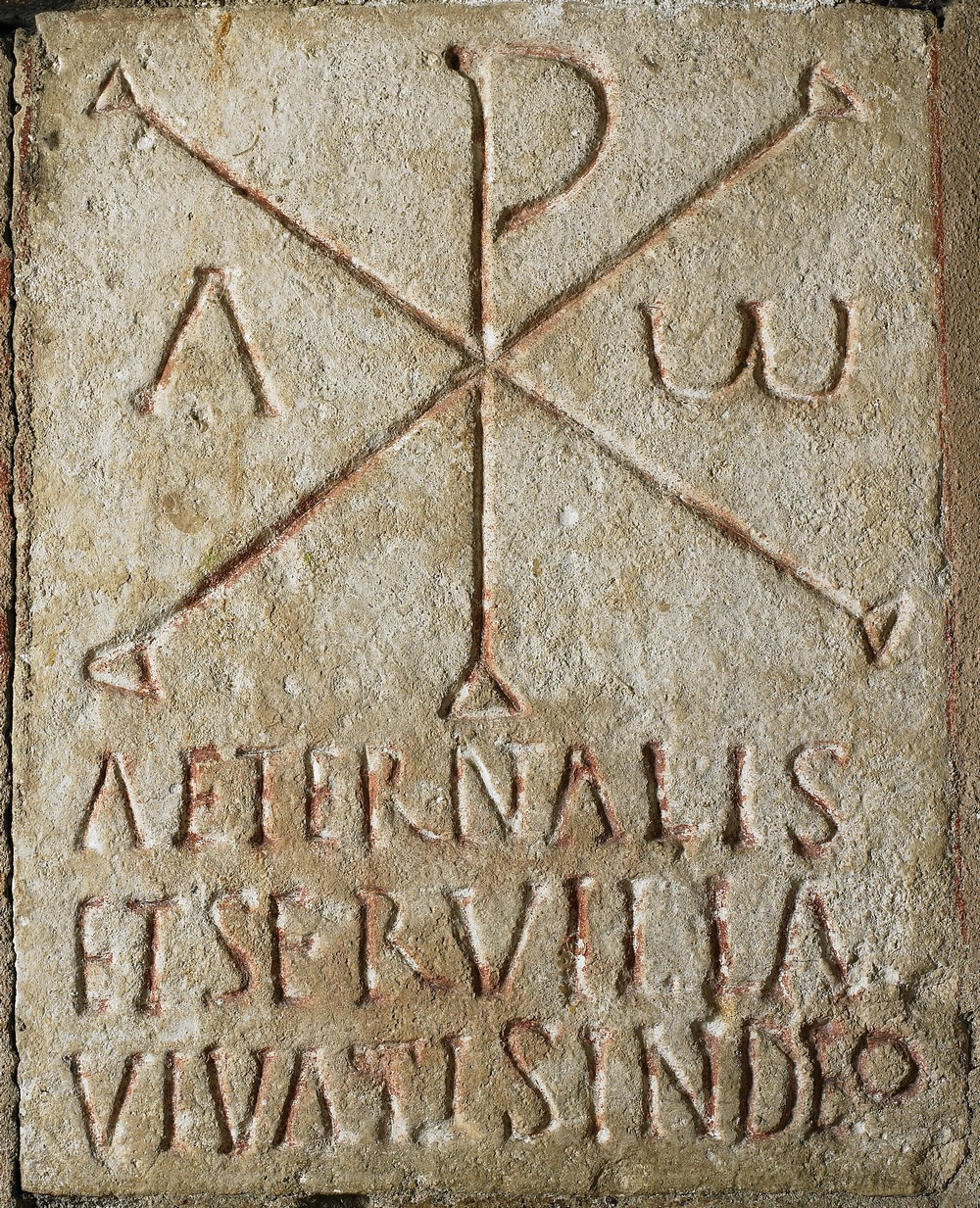 Stèle chrétienne du IVe siècle. Une inscription en latin est présente : "Alternalis et Servilla, vivatis in Deo".